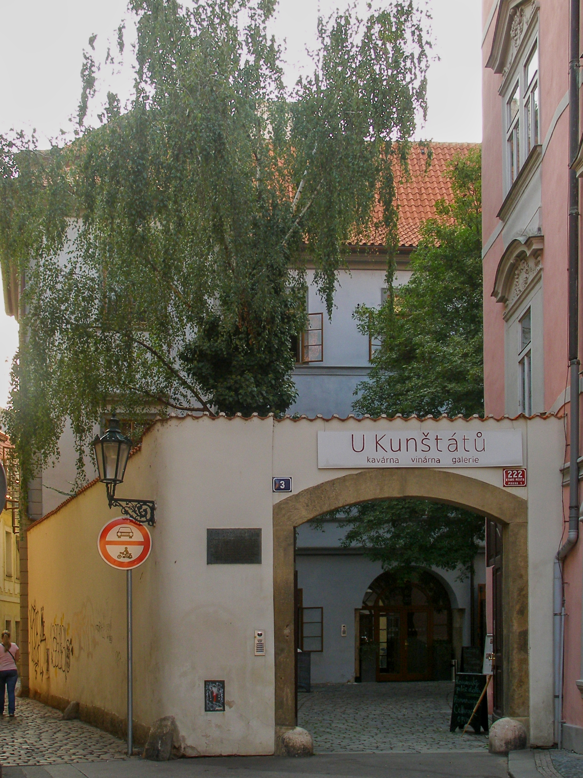 Městský dům - Dům pánů z Kunštátu (Staré Město), Praha 1, Řetězová 222/3, Staré Město